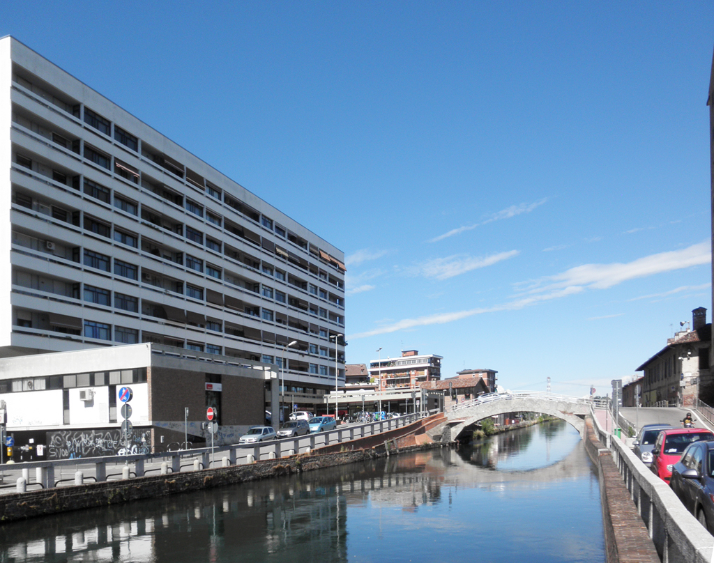 Panorama di Trezzano sul Naviglio con il Naviglio Grande